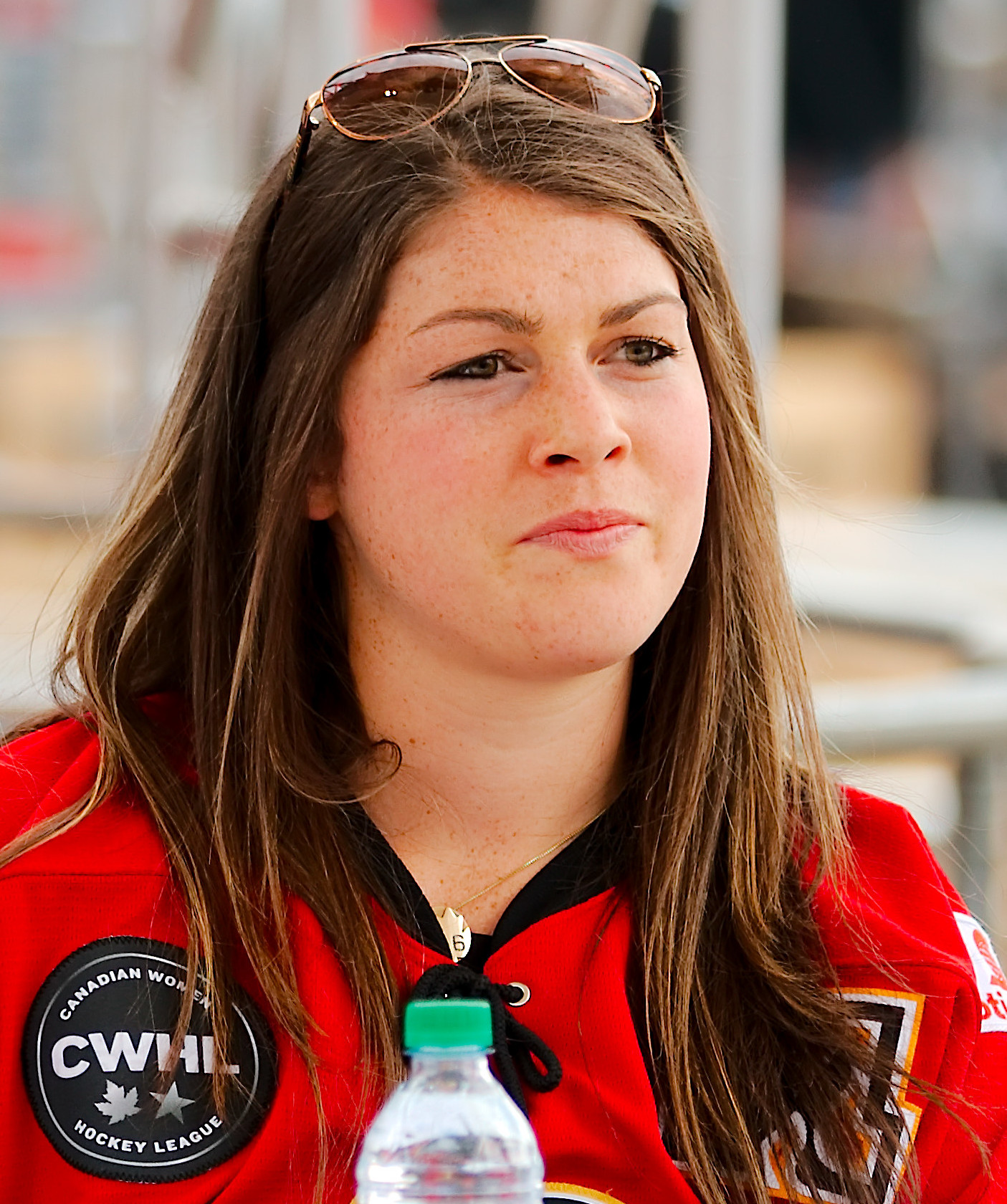 Rebecca Johnston in 2016